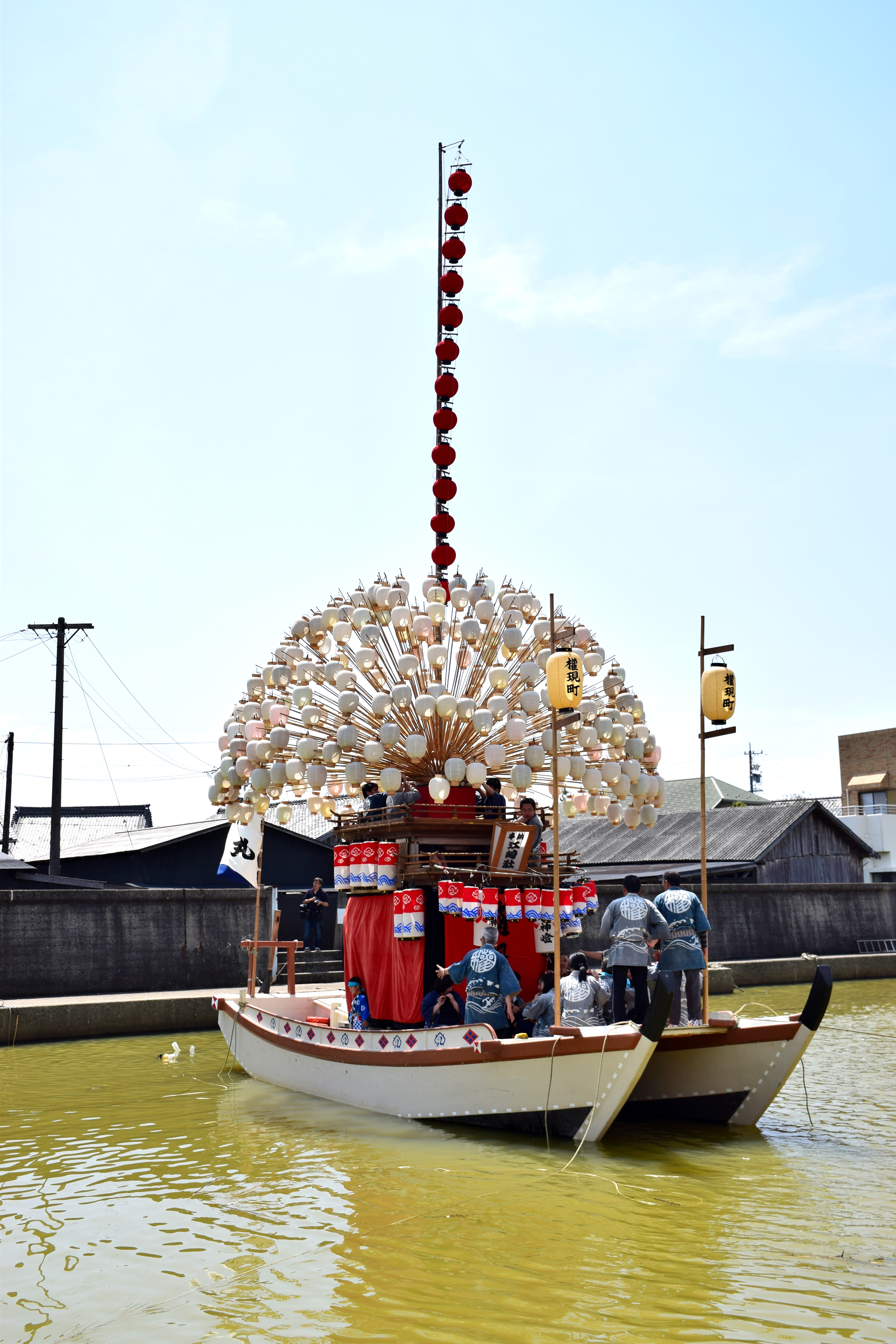 大野祭り（権丸）